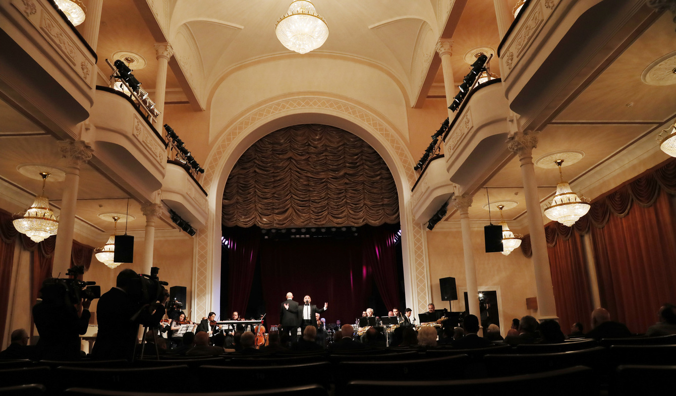 Fəxri Kazım Nicatın Rəşid Behbudov adına Dövlət Mahnı Teatrında ifası